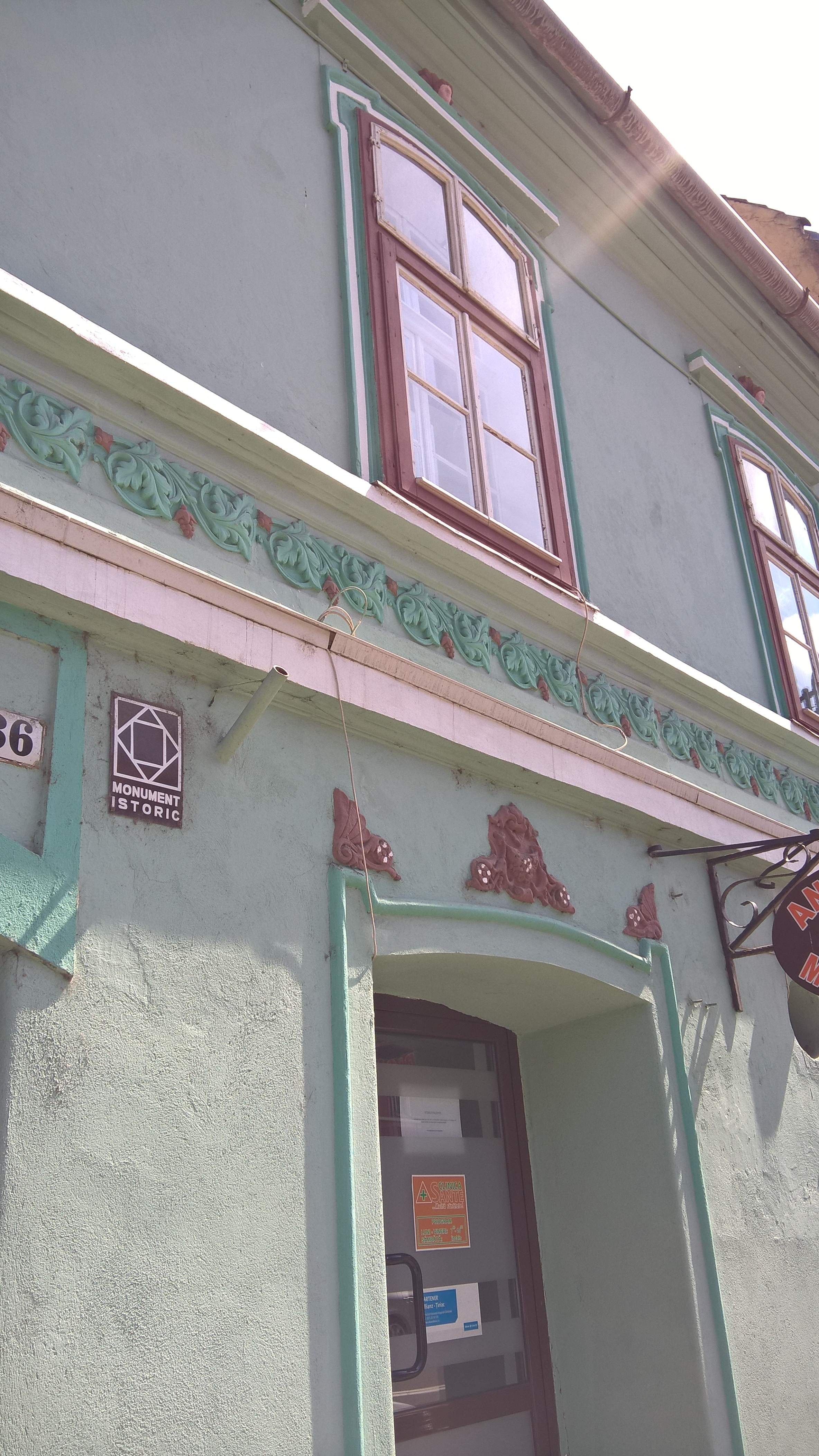 Casă Centrul istoric Sighisoara